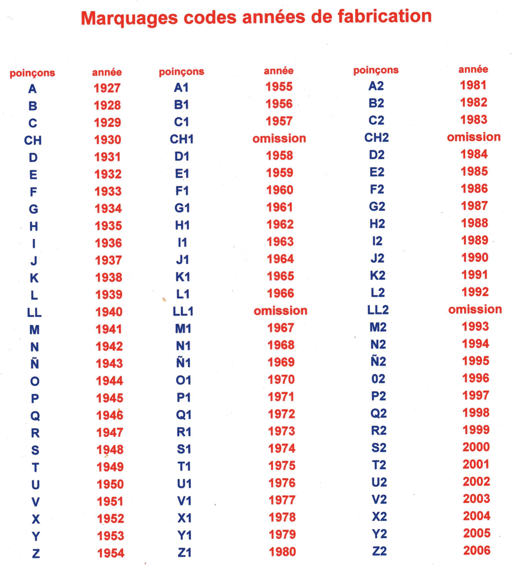 Auteur Gnafron,tableau scannérisé.